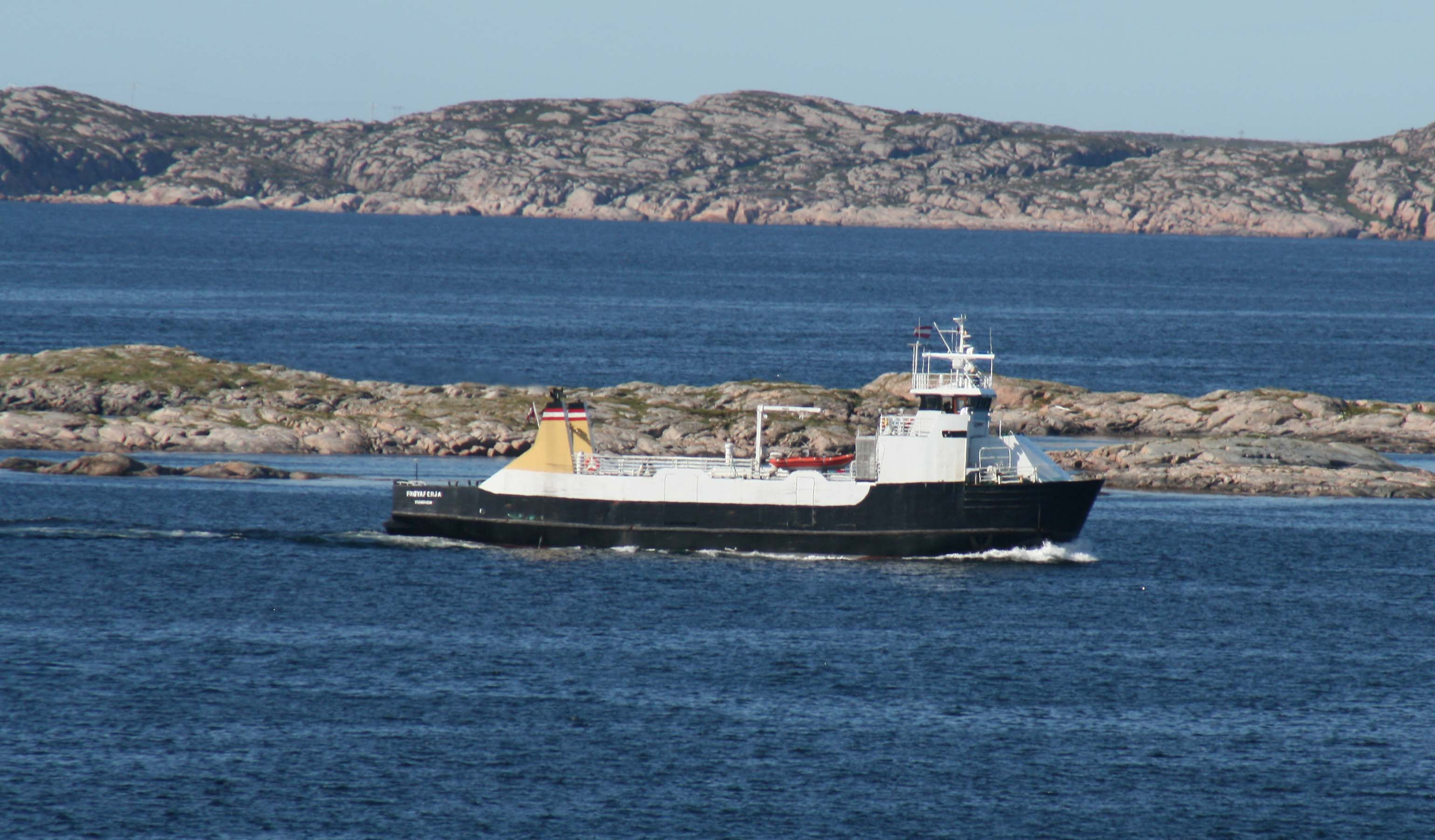 Norsk (bokmål: M/F Frøyaferja IMO number: 7529938 Callsign: LDAO